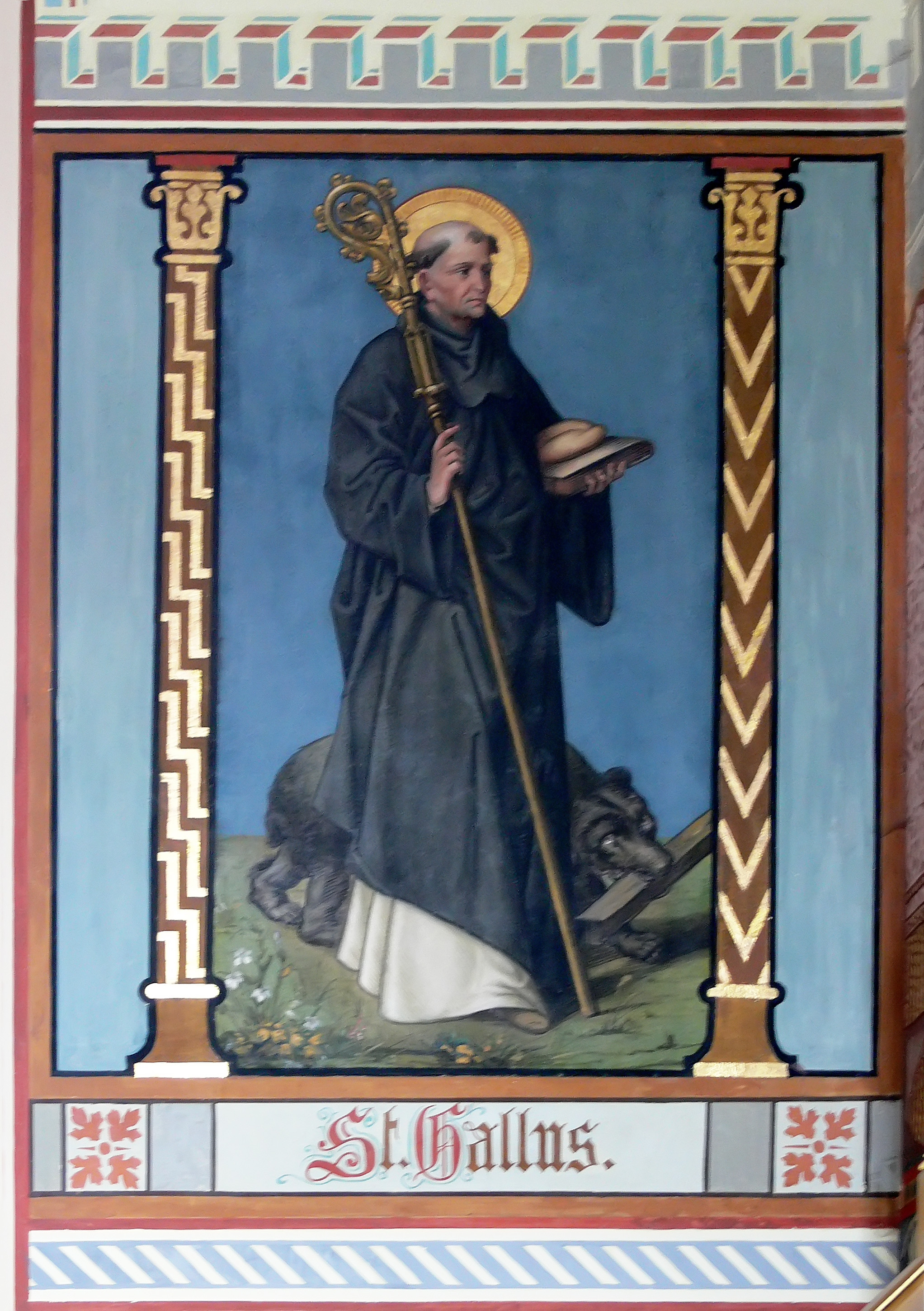 Filialkirche St. Venantius, Pfärrenbach, Gemeinde Horgenzell Wandgemälde im Kirchenschiff: Hl. Gallus